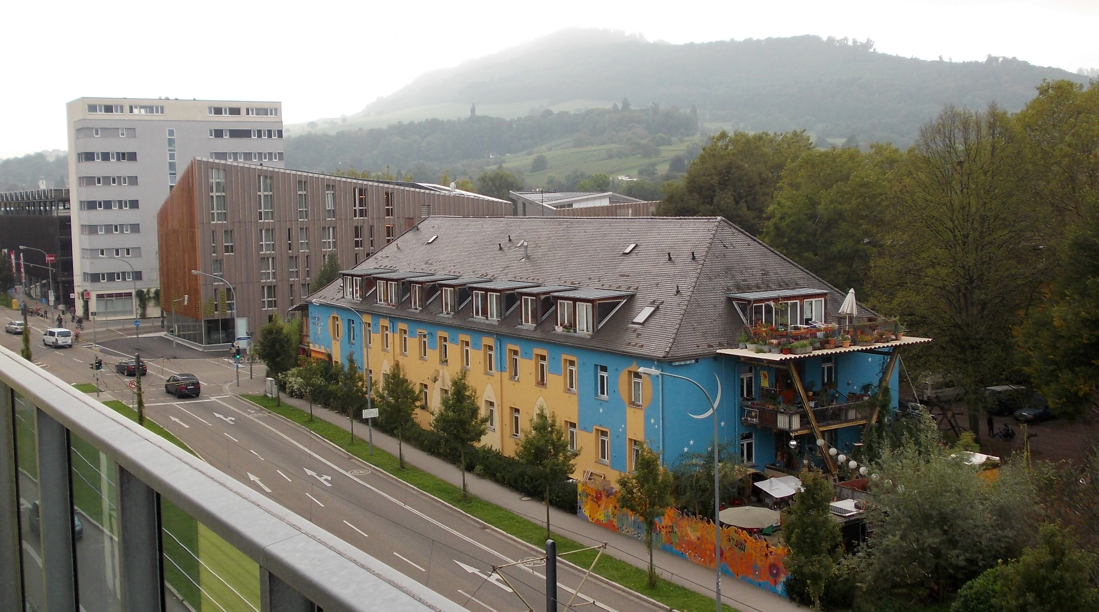 Blick vom Sonnenschiff auf den Stadtteil Vauban in Freiburg: v.l.n.r. Solargarage, Kontorhaus, Green City Hotel, SUSI-Wohnprojekt, im Hintergrund der Schönberg